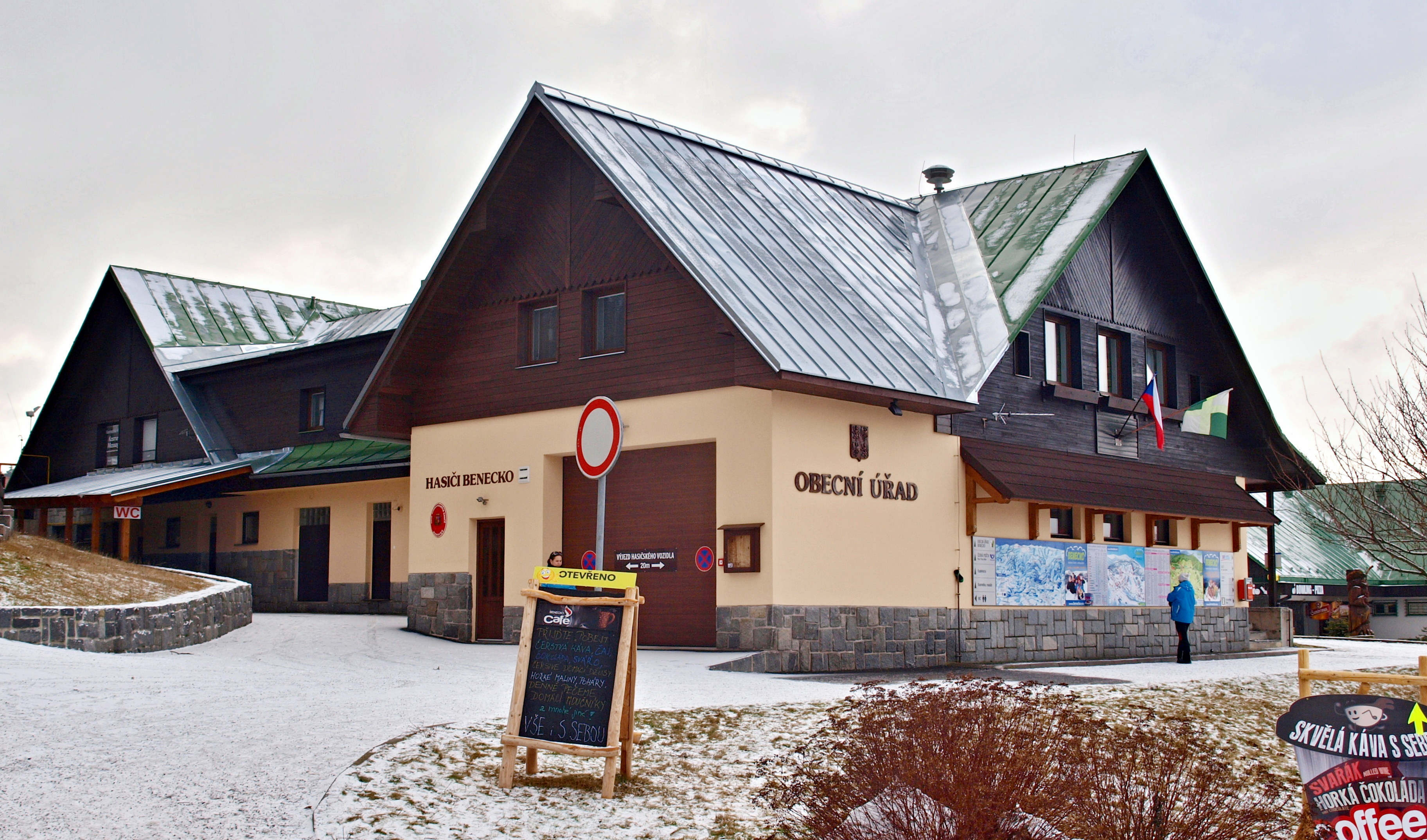 Krkonoše, Benecko